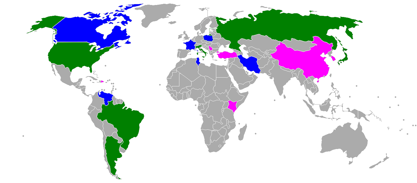 Pays participants aux épreuves de Volley-ball aux Jeux olympiques d'été de 2020. Vert : homme et femme, Bleu : homme, Rose : femme.